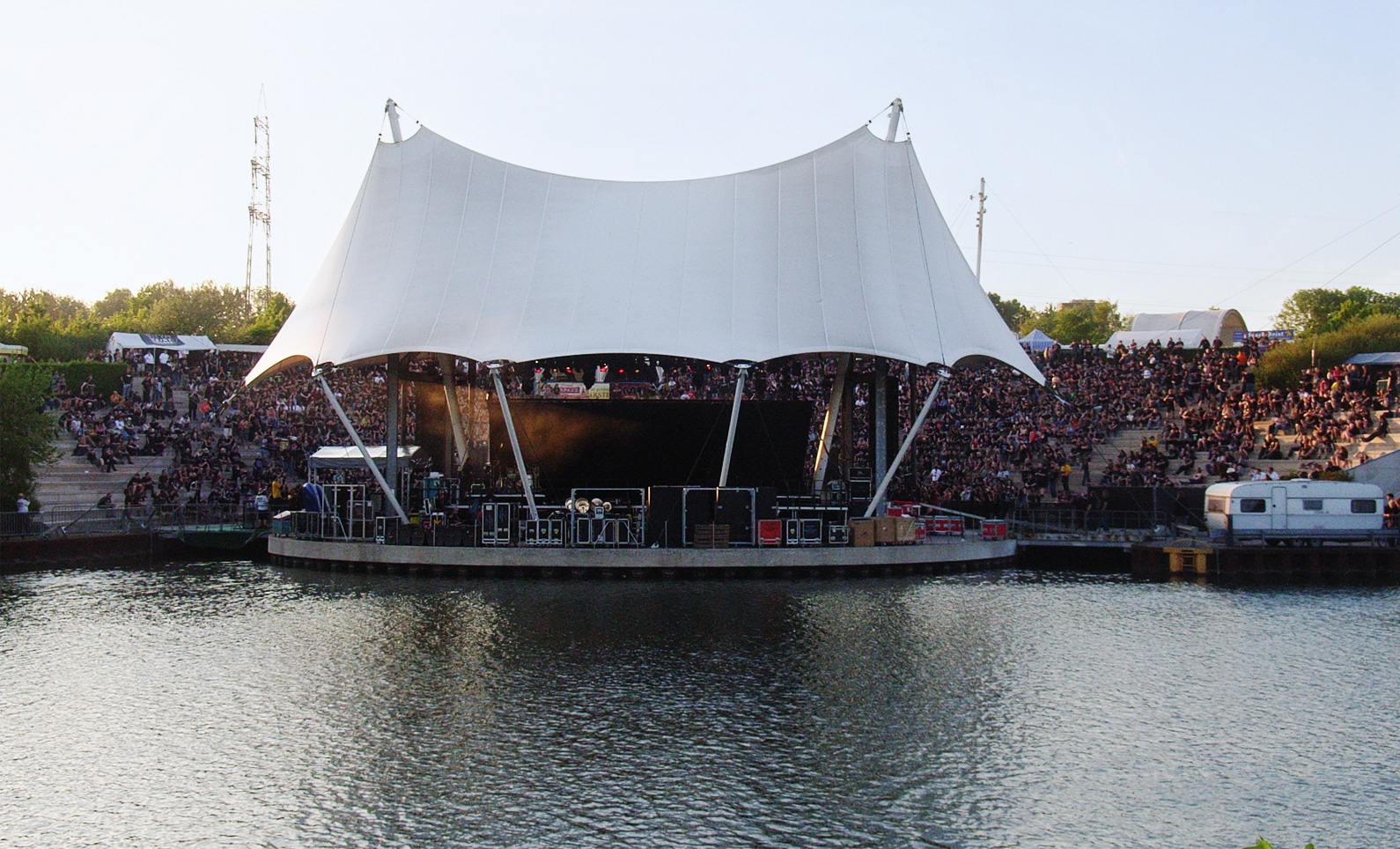 Rock Hard Festival 2008 - Amphitheater vom gegenüberliegenden Ufer des Rhein-Herne-Kanals aus fotografiert.